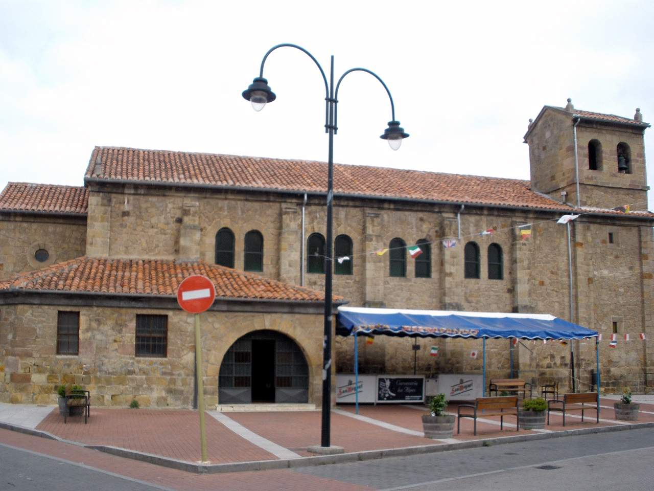 Iglesia de los Santos Justo y Pastor, en la Plaza de La Llana de Sierrapando, Torrelavega (Cantabria)